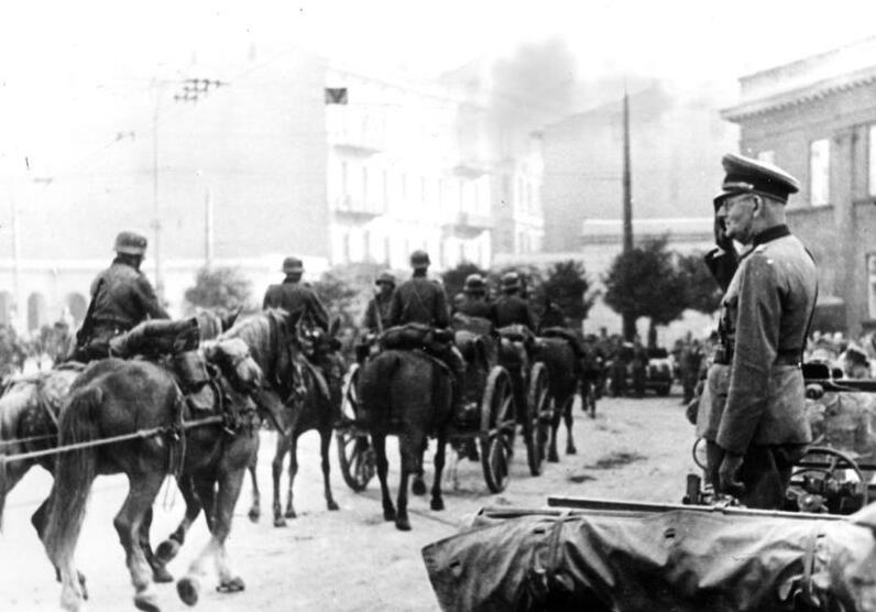 Lodz, Einzug deutscher Truppen Zentralbild II. Weltkrieg 1939-45 Überfall der faschistischen deutschen Wehrmacht auf Polen am 1.9.1939. Einzug der deutschen Truppen am 9.9. in Lodz. Der Kommandierende General des XIII. A K Maximilian Freiherr von Weichs nimmt den Vorbeimarsch seiner Truppen ab. 11341-39 Abgebildete Personen: Weichs, Maximilian von Freiherr: Generalfeldmarschall, Ritterkreuz, Heer, Deutschland (GND 117235202)